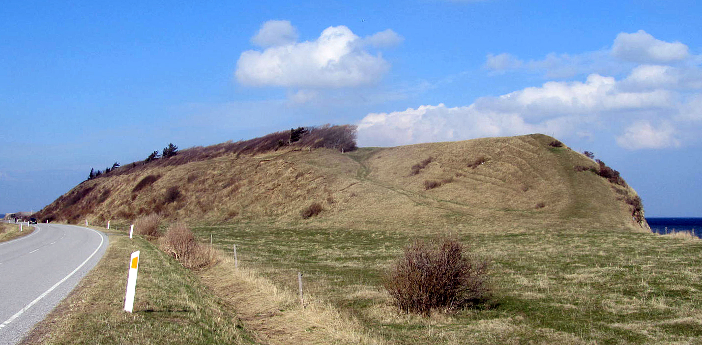 Feggeklit set fra syd